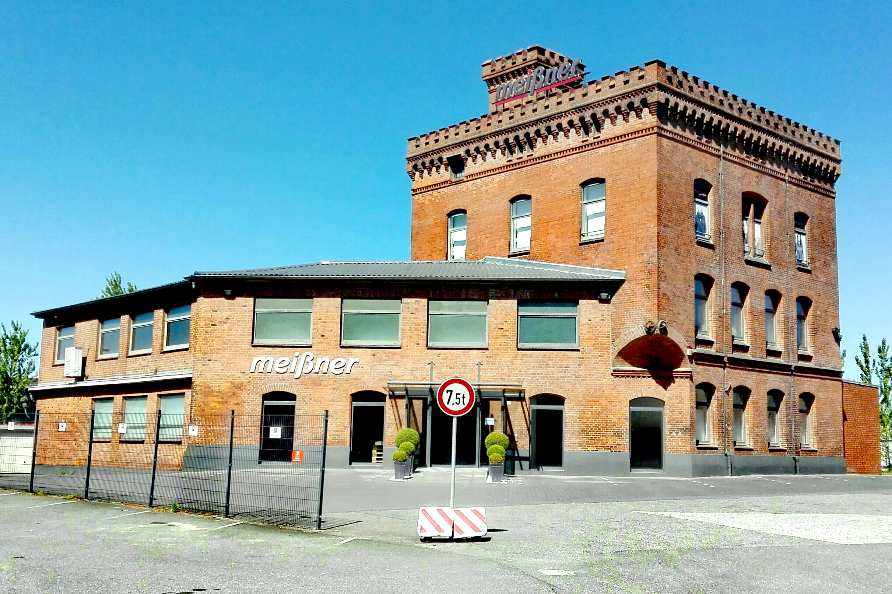 Ehemaliges Verwaltungsgebäude der Schiffswerft mit den beiden verbliebenen symbolischen Steuerrädern über dem einstigen, im Rahmen einer Gebäudeerweiterung zugemauerten, Eingangsportal.